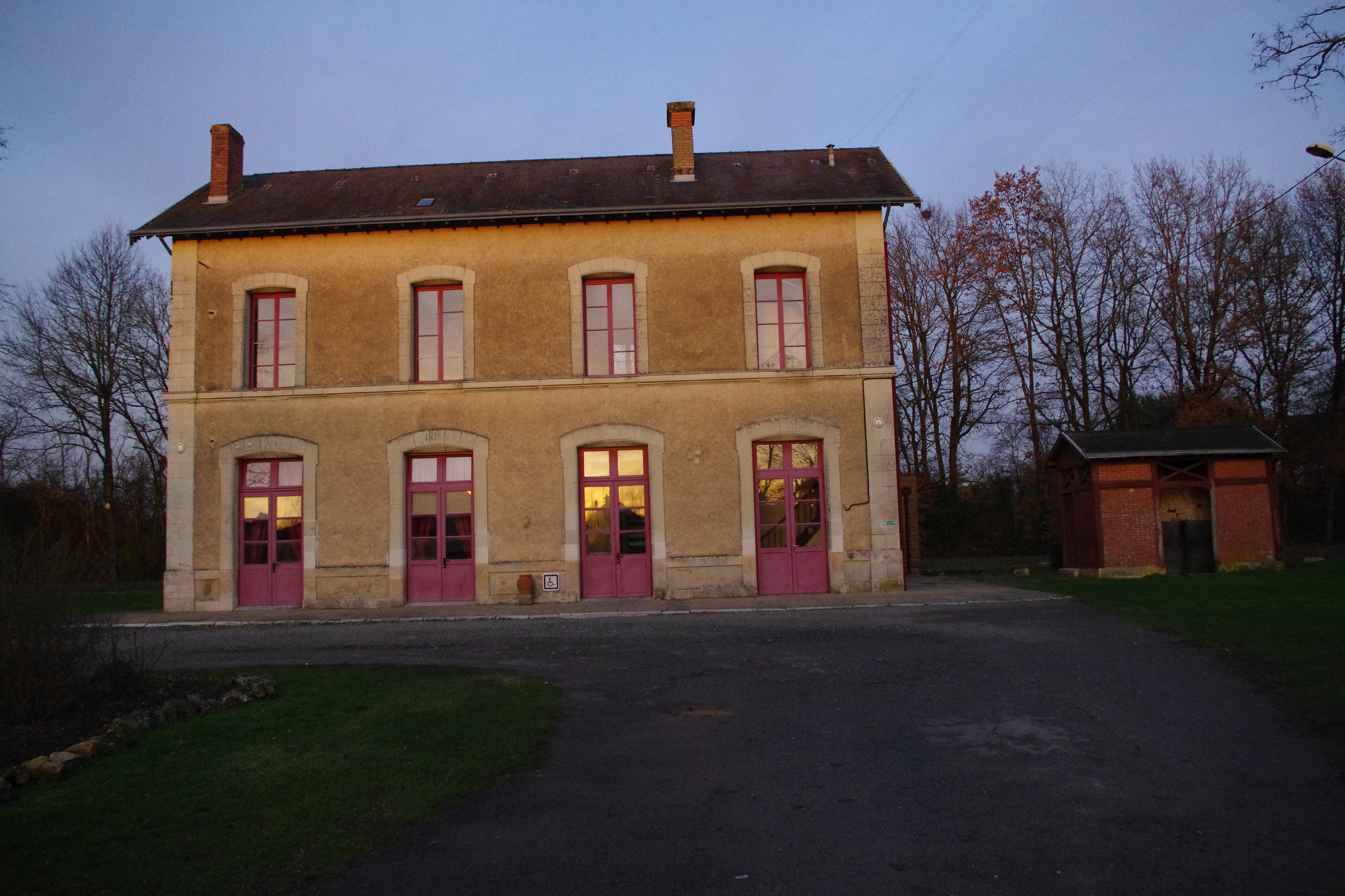 Vue de la gare côté accès public